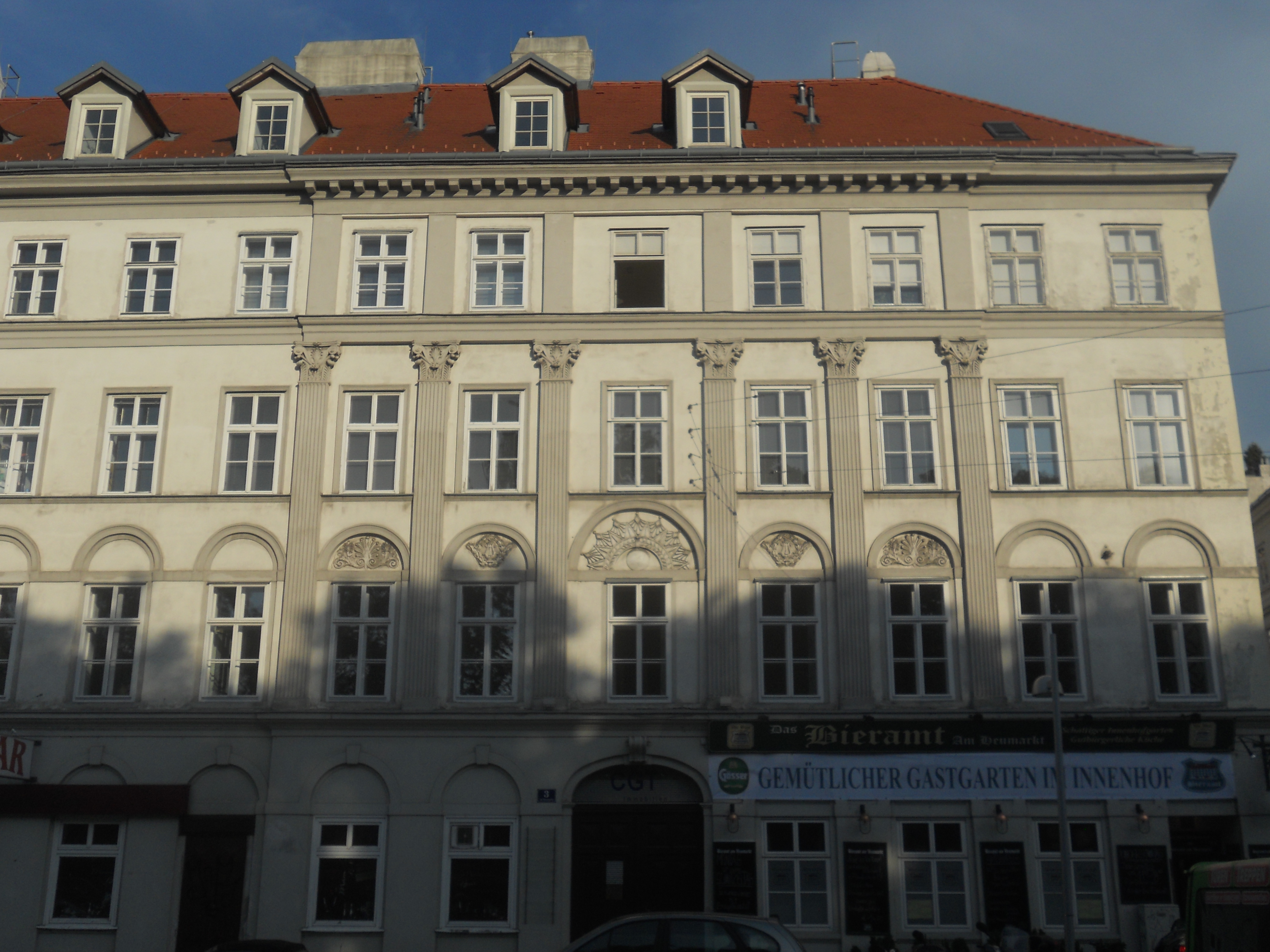 Haus Am Heumarkt 3 in Wien